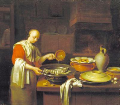 Kitchen interieur